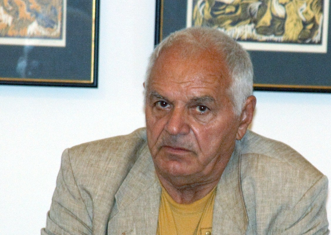 Юрий Ильенко, режиссёр